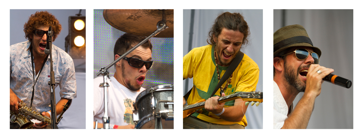 Su primer cd independiente se titula “No paga la renta”. Ha compartido escenarios y giras con las bandas mas importantes del género a nivel nacional como son Los Cafres, Resistencia Suburbana, Nonpalidece entre otros, y de otros países como Gondwana (Chile) Pure Felling (Brasil) y Junior Marvin y The Fully Foolwood band en la tercera edición del Bob Marley Day (Jamaica). ( Foto: Estrella Herrera)